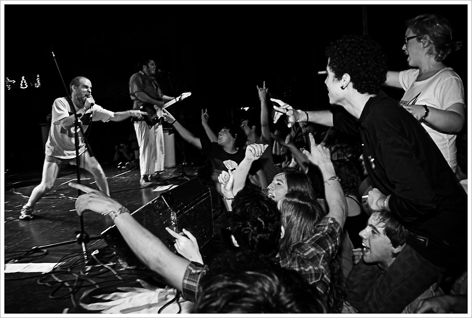 Fotografía de la banda uruguaya Cuatro Pesos de Propina en vivo en el Canal 5.